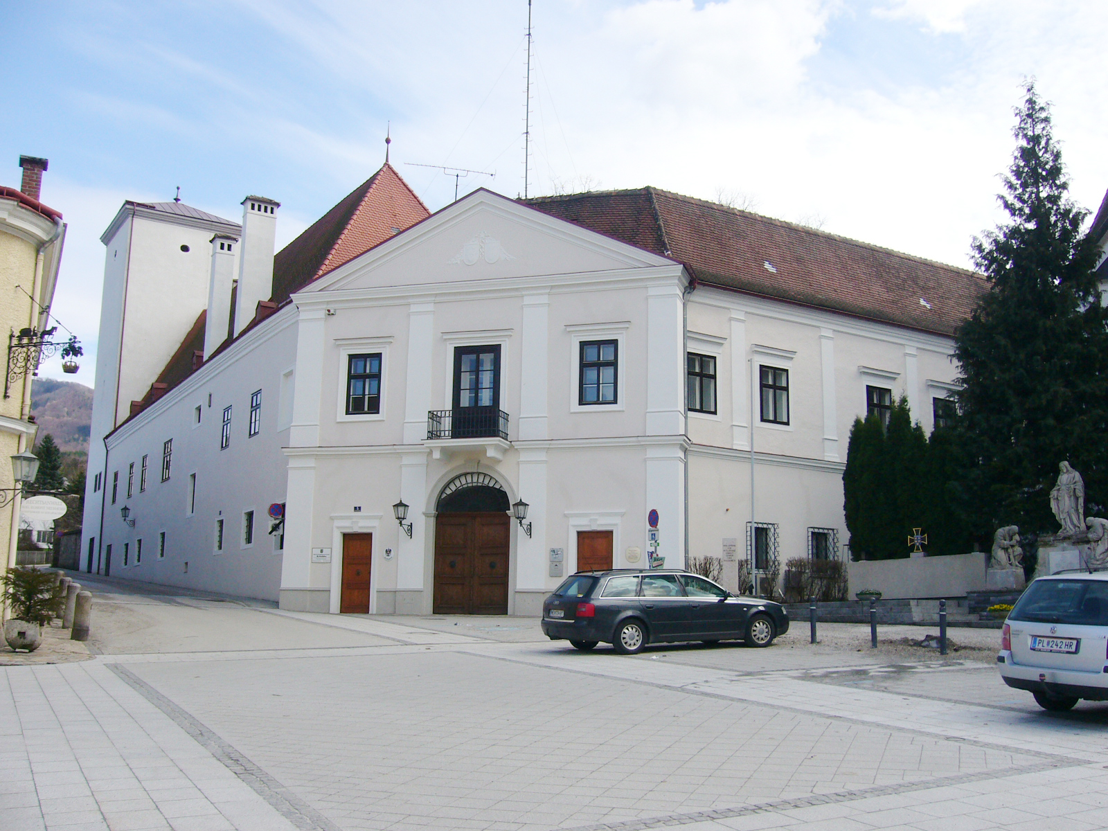 Schloss Scheibbs